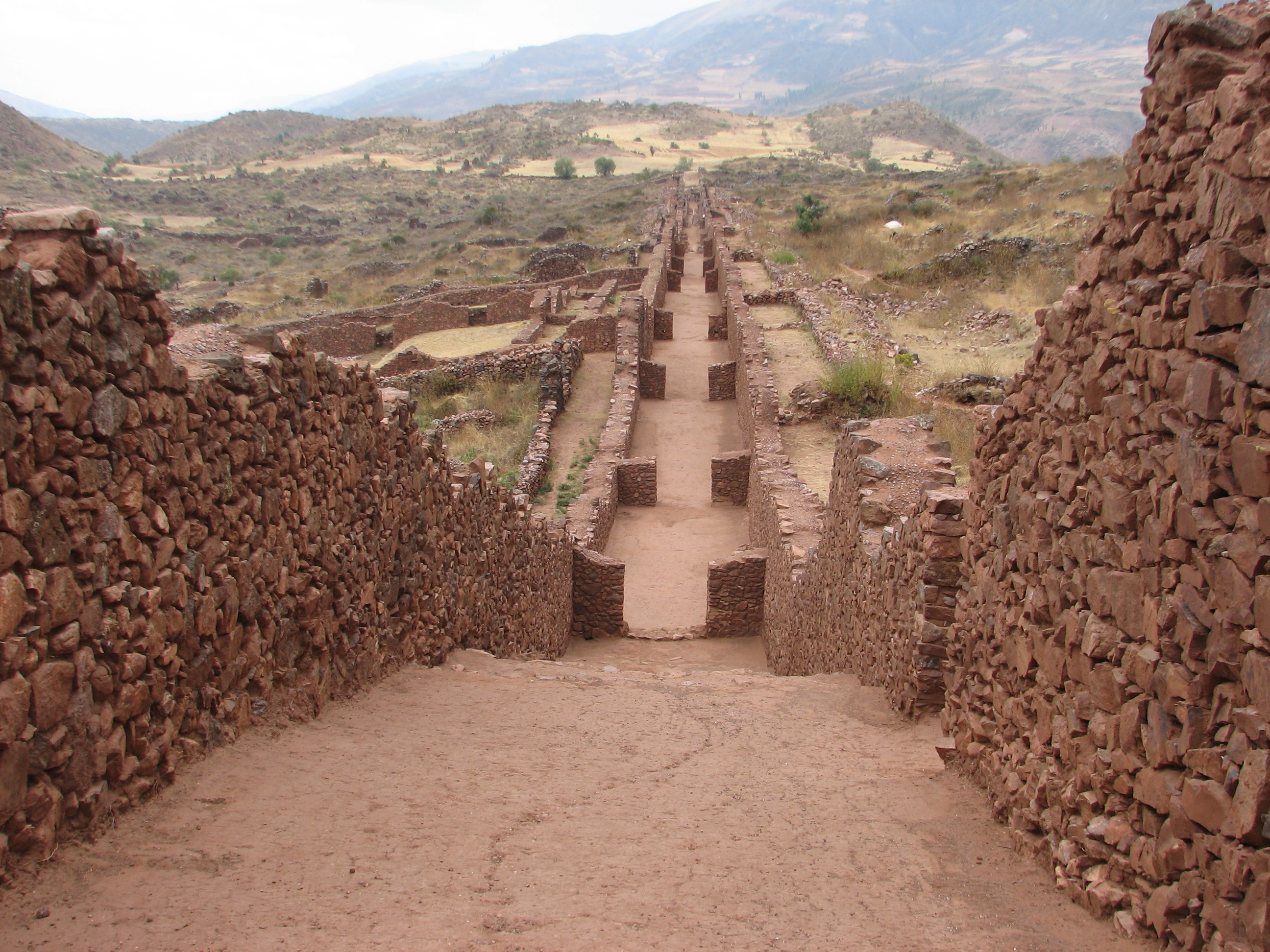 Piquillacta Archaeological site (street)